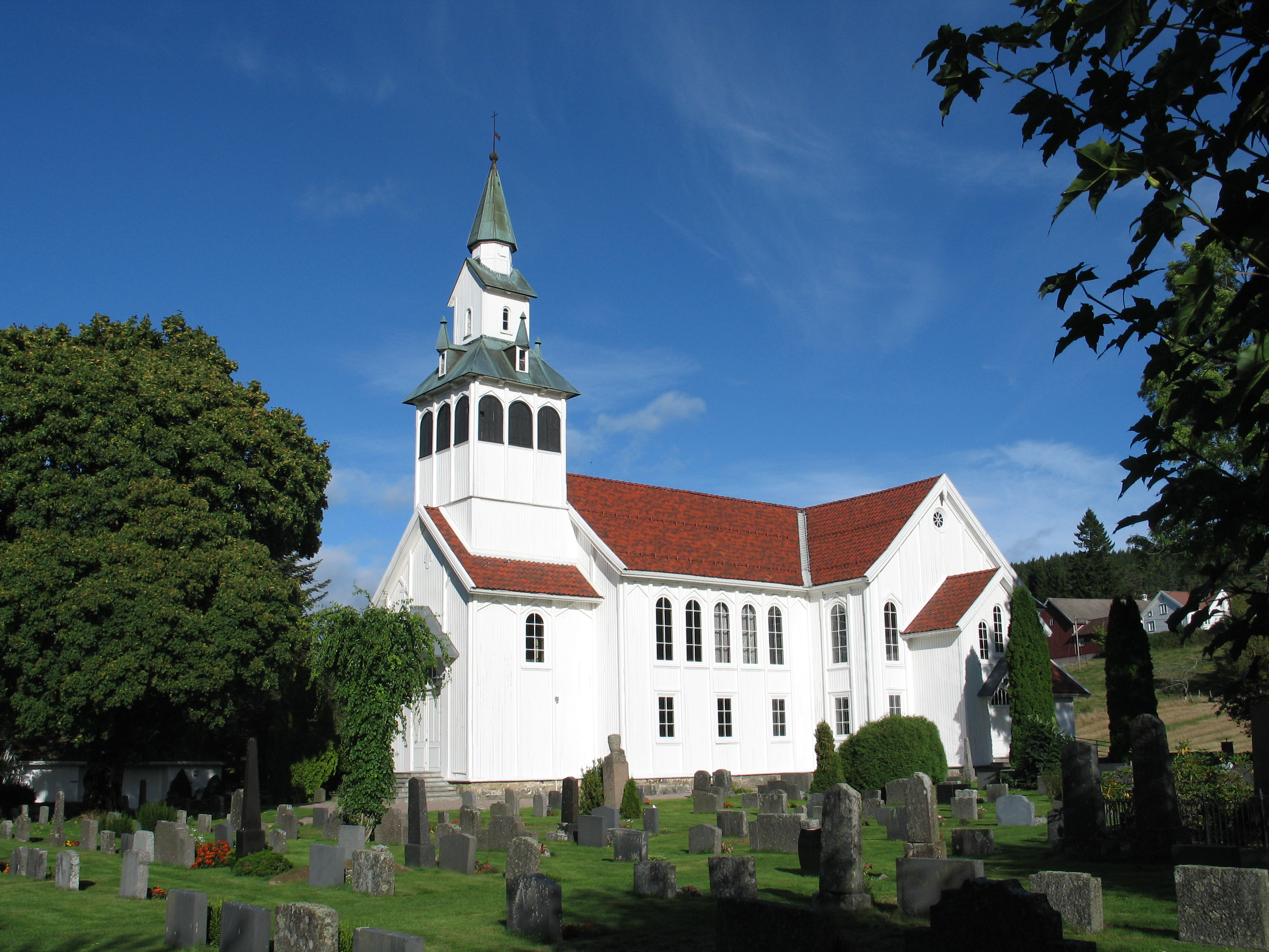 Birkenes kirke